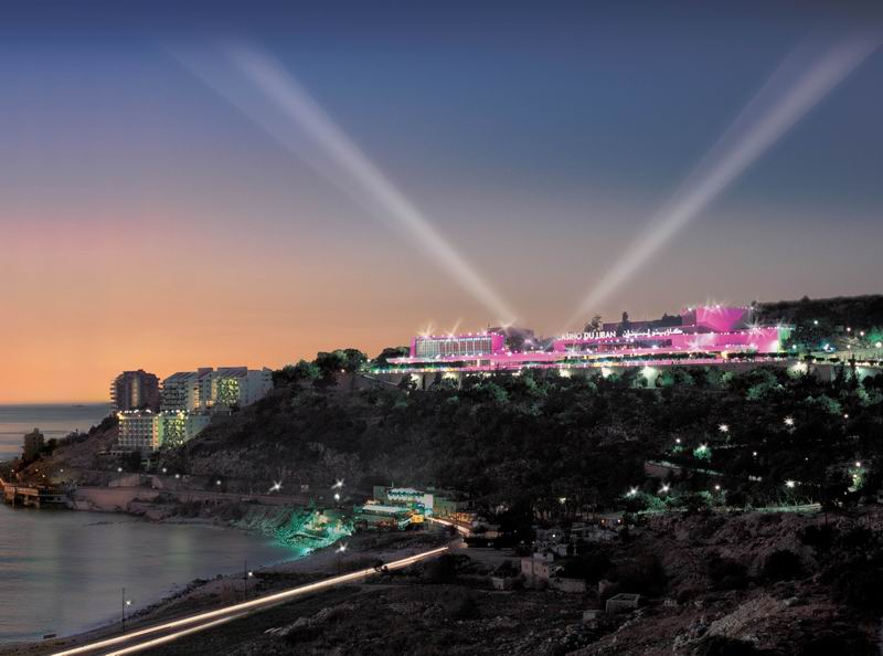 Casino du Liban at night.